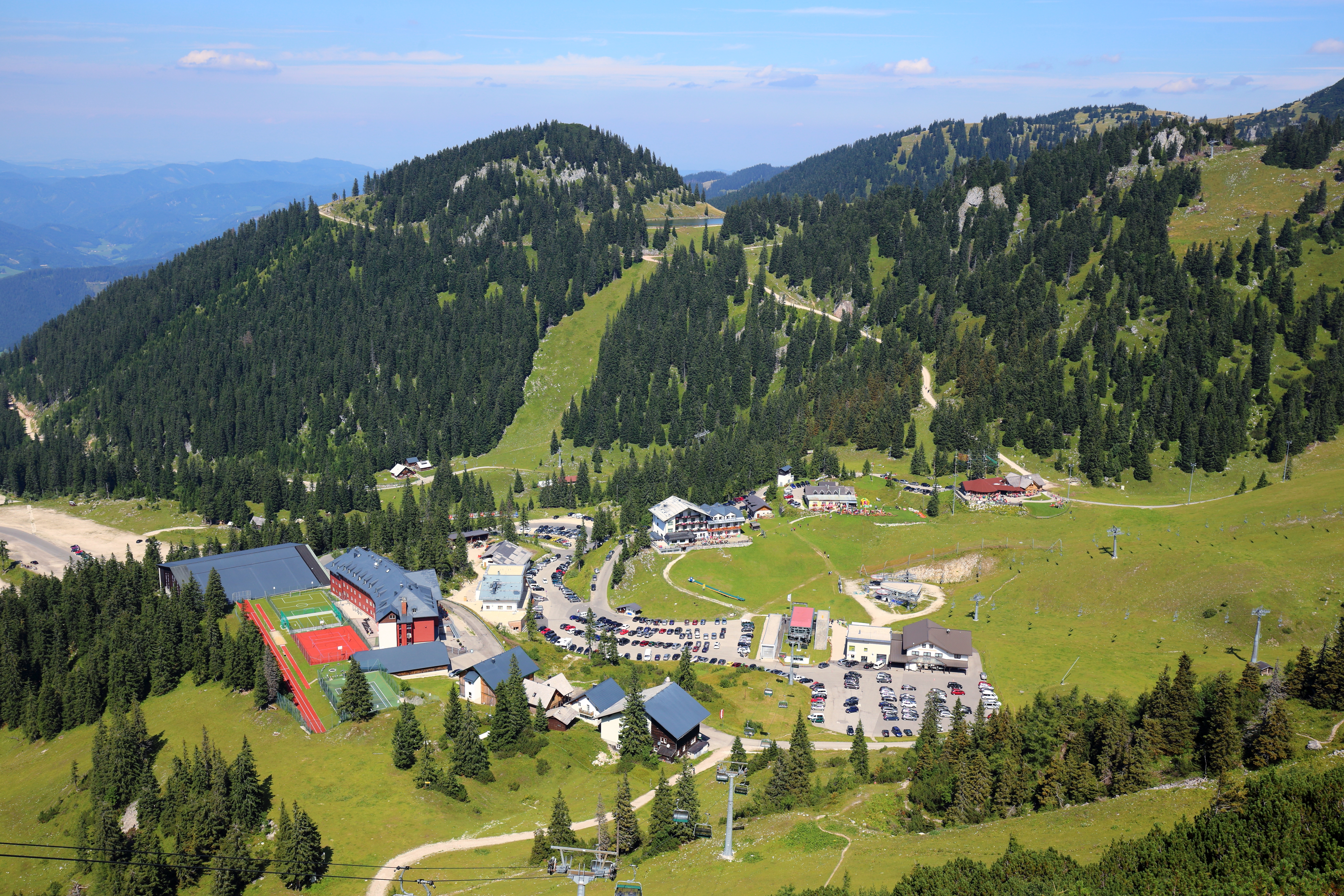 Südansicht der Talstation des Schigebietes Hochkar in der niederösterreichischen Marktgemeinde Göstling an der Ybbs.